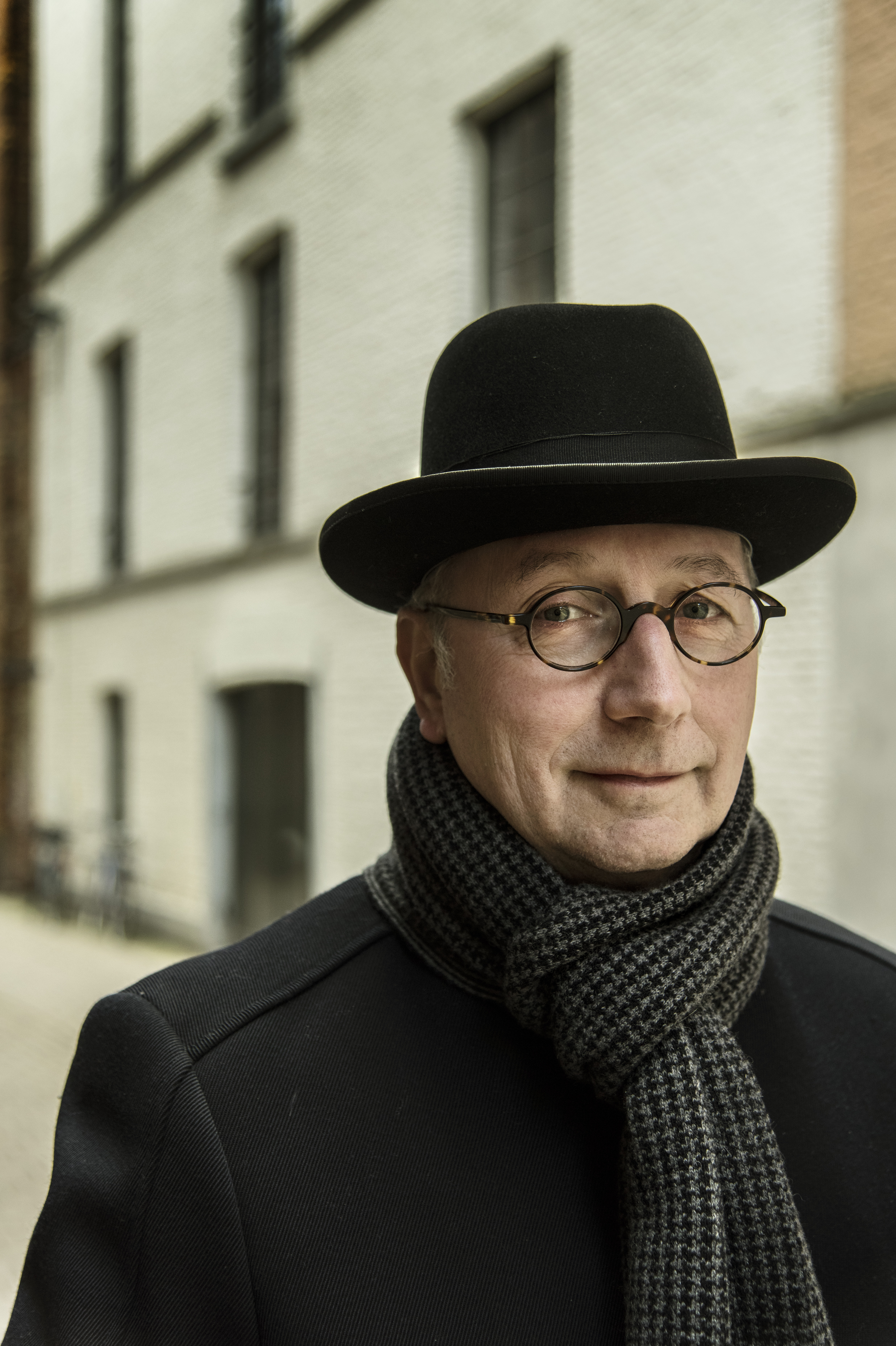 Ivan Ollevier, Belgisch journalist, schrijver en dichter.